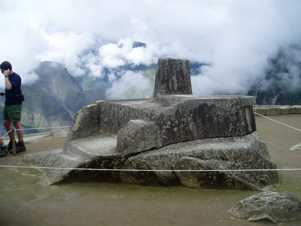 Intihuatana (solar clock) at Machu Picchu, Peru